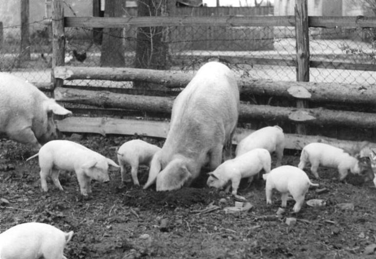 Versuchsgut Paulinenaue im Freigehege Panorama-Foto Berlin-Weissensee Trarbacher Str. 7 - Tel 56 07 84 Bei Abdruck Urheber nennen